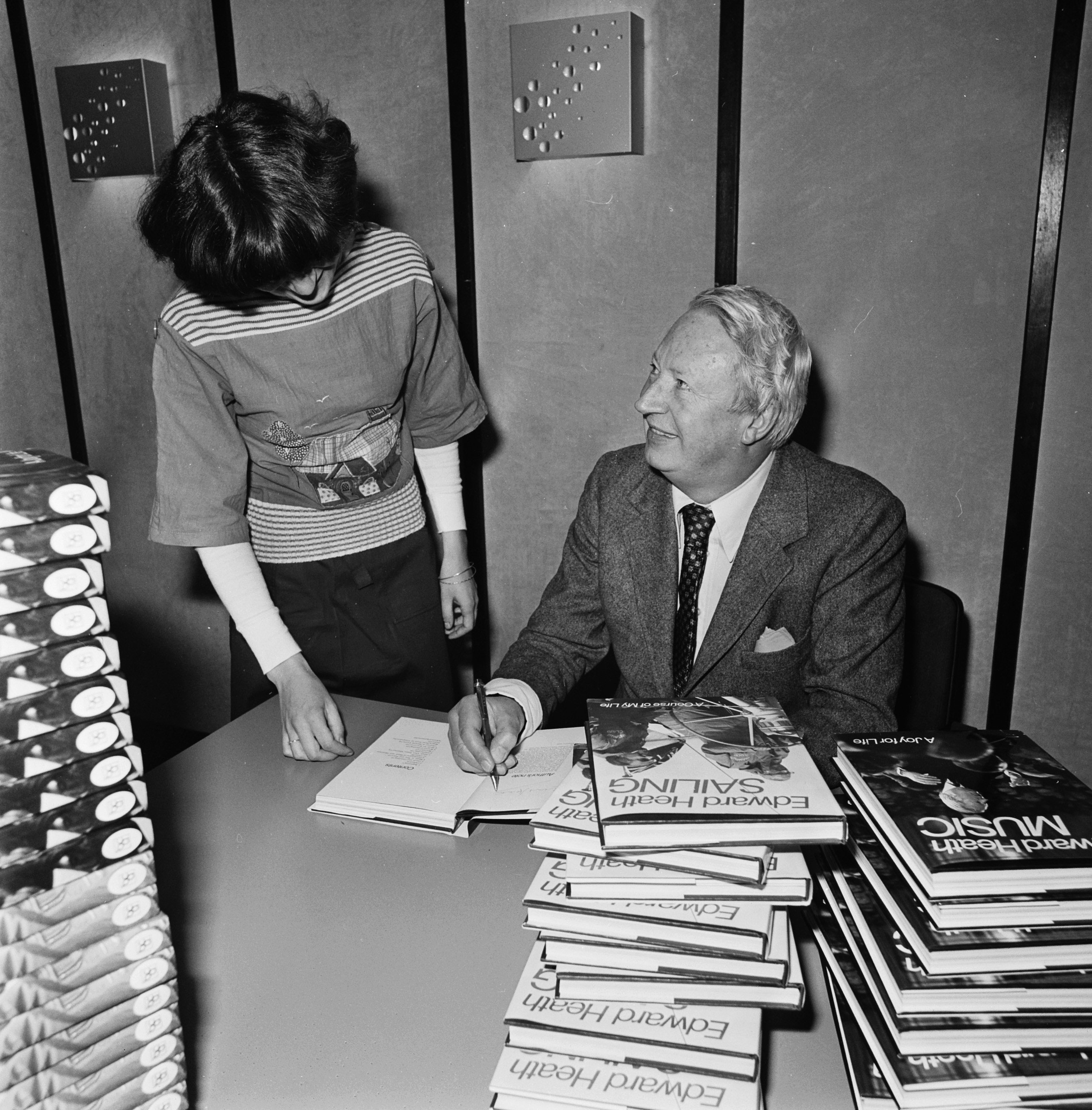 Collectie / Archief : Fotocollectie Anefo Reportage / Serie : De Britse oud-premier Edward Heath signeert in de Amsterdamse Leidsestraat boeken van zijn hand Beschrijving : boeken, politici Datum : 19 april 1977 Locatie : Amsterdam, Noord-Holland Trefwoorden : boeken, politici Persoonsnaam : Heath, Edward Fotograaf : Croes, Rob C. / Anefo Auteursrechthebbende : Nationaal Archief Materiaalsoort : Negatief (zwart/wit) Nummer archiefinventaris : bekijk toegang 2.24.01.03 Bestanddeelnummer : 929-1293